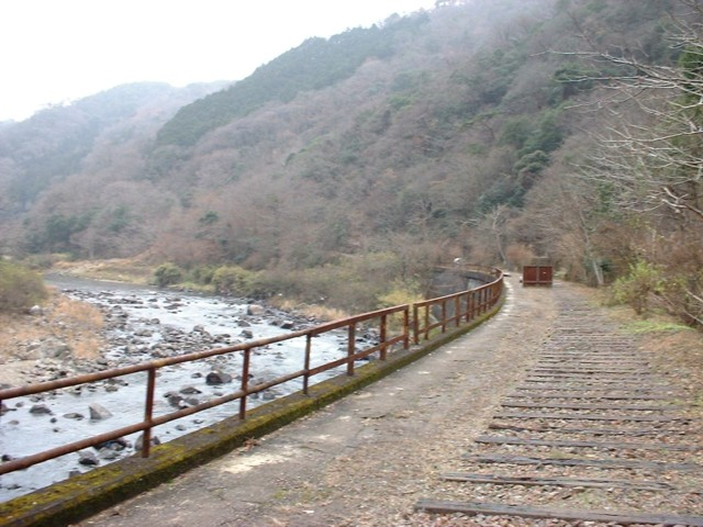 武庫川中流の福知山線旧線跡